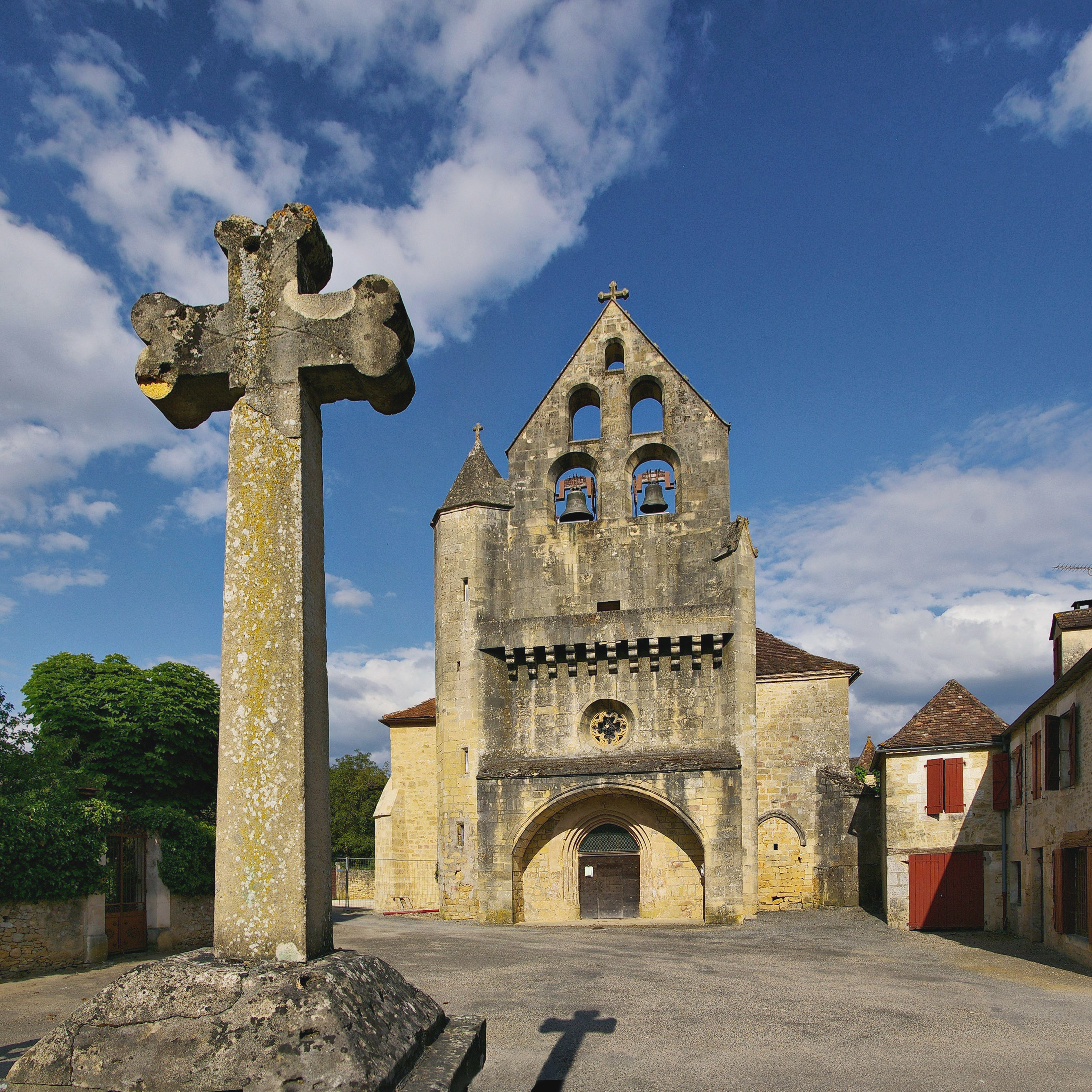 Église Saint-Sixte de Lamothe-Fénelon